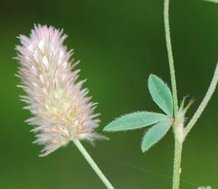 Trifolium arvense var arvense, Pied de lièvre, Corse